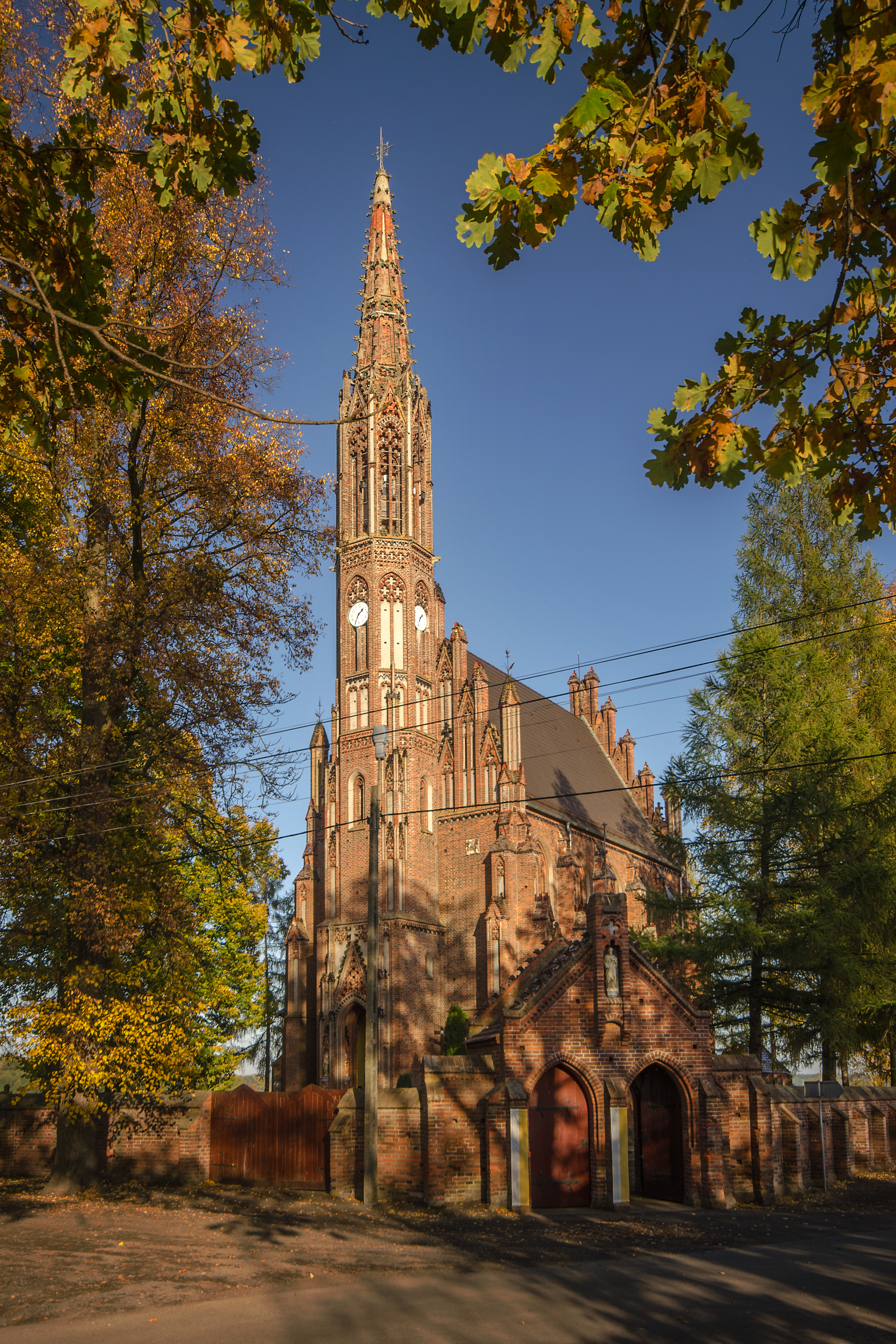 Tuły, kościół par. p.w. Matki Boskiej Bolesnej (nr 41a), 1853